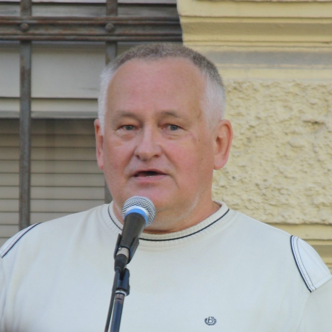 Ivan Odilo Štampach Ve čtvrtek 1. září 2011 přišly demonstrovat před ministerstvo školství odhadem dvě až tři stovky lidí proti působení Ladislava Bátory na úřadu. Protestní akci pořádala ve spolupráci s nevládními organizacemi Strana zelených. Její předseda Ondřej Liška varoval před růstem pravicového extremismu a rasismu ve společnosti a jeho pronikání do politiky. Kromě něj promluvili mimo jiné předseda Židovské obce v Praze František Bányai a iniciátor petice Ne Bátorovi Radek Matuška. Sám Bátora na chvíli vyhlédl z okna ministerstva. This photograph was taken with a DSLR from WMCZ's Camera grant.